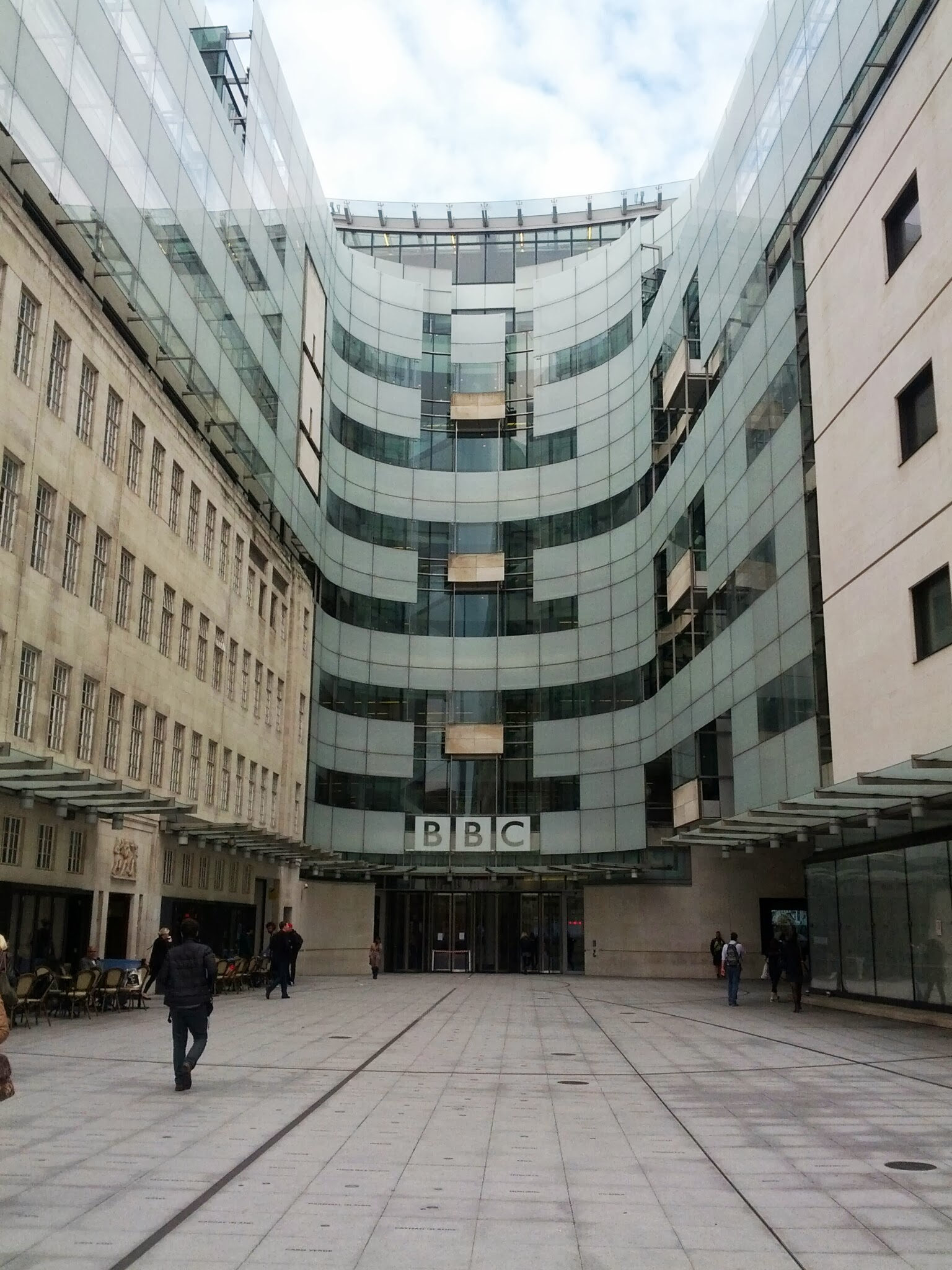 LONDON BBC HQ